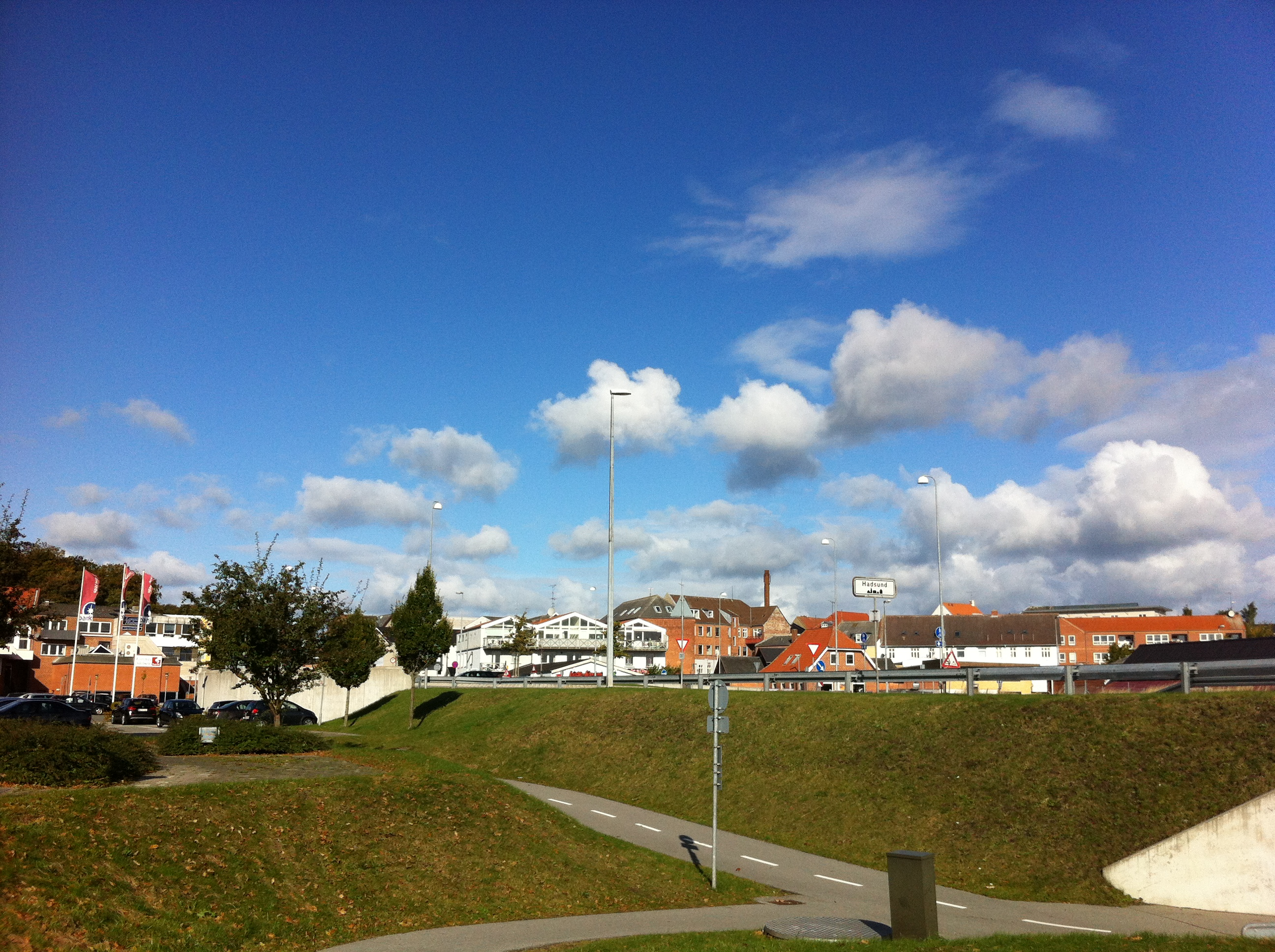 Billedet er tagede lige når man kommer over Hadsundbroen fra Hadsund Syd